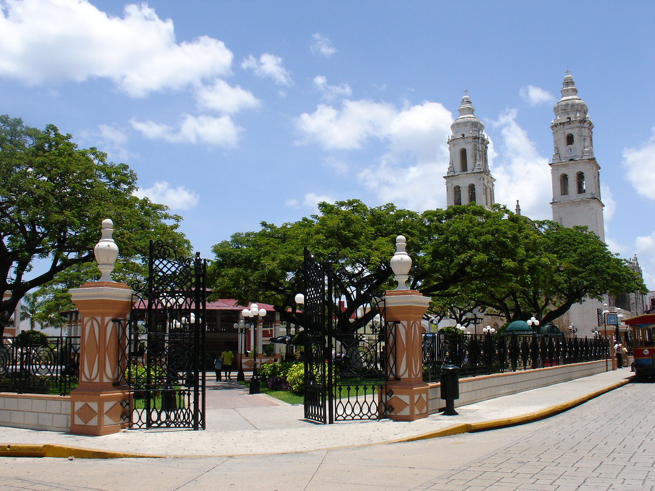 Catedral de San Francisco de Campeche